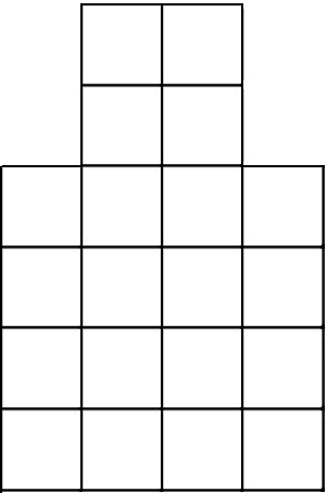 虎棋棋盤的一種。